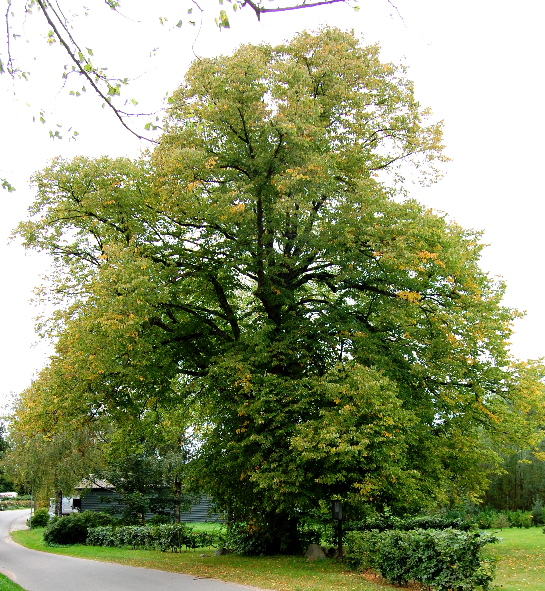 Billede af Præstens træ i Hornum